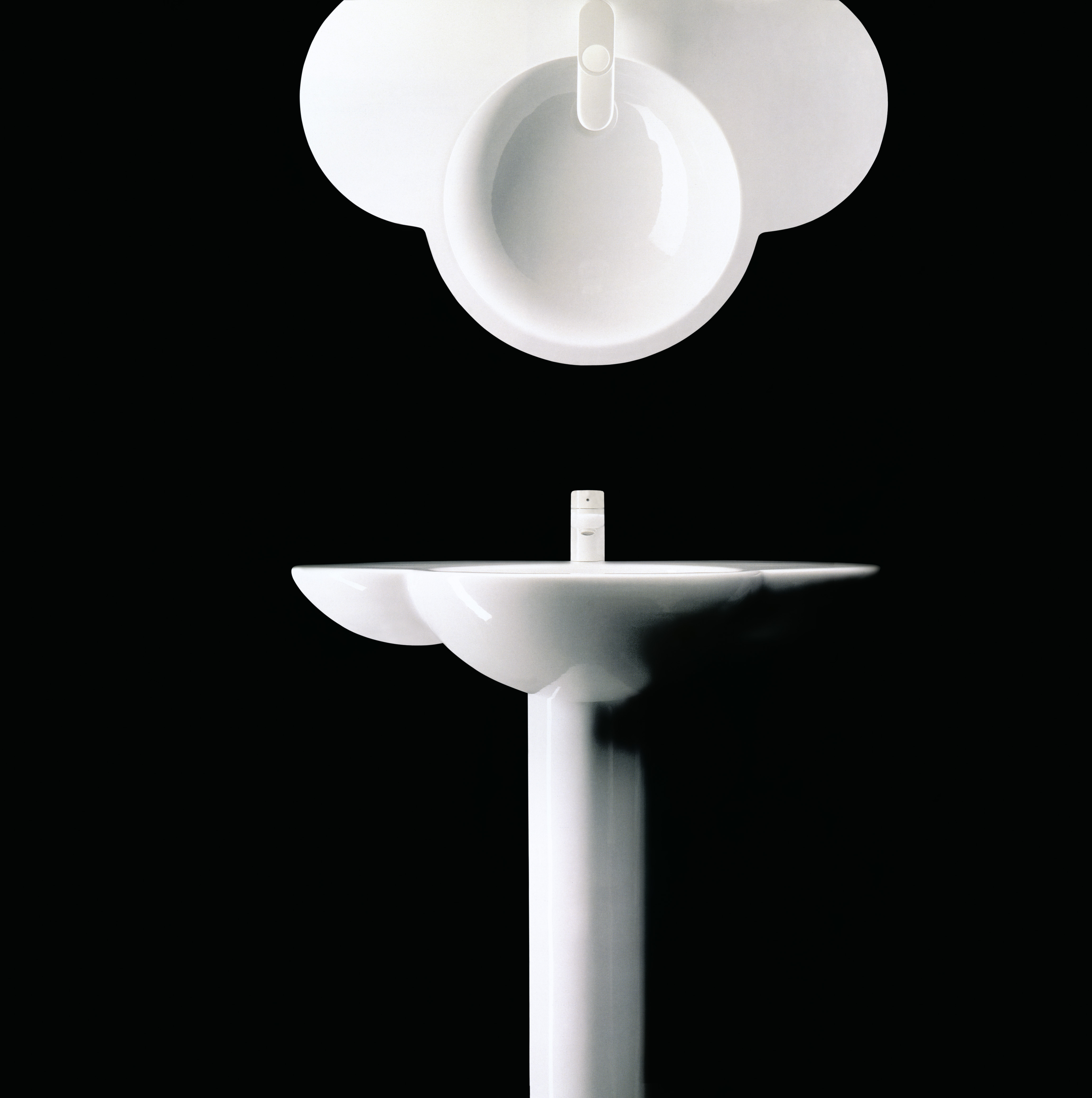 Waschtisch Giamo (Duravit)